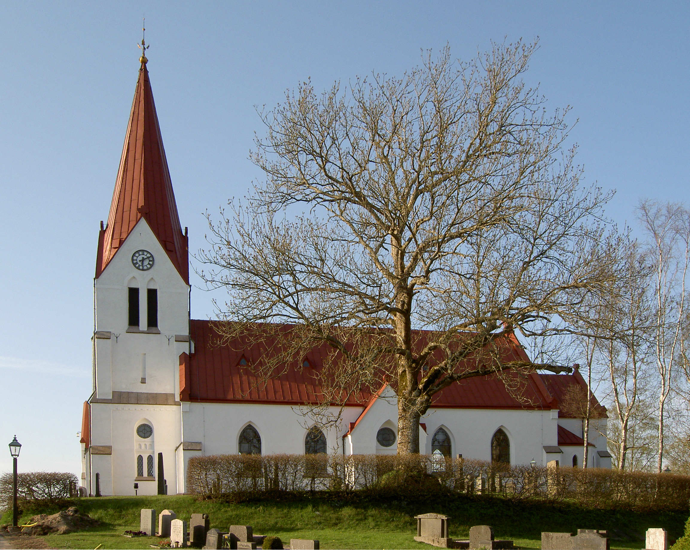 Röke kyrka